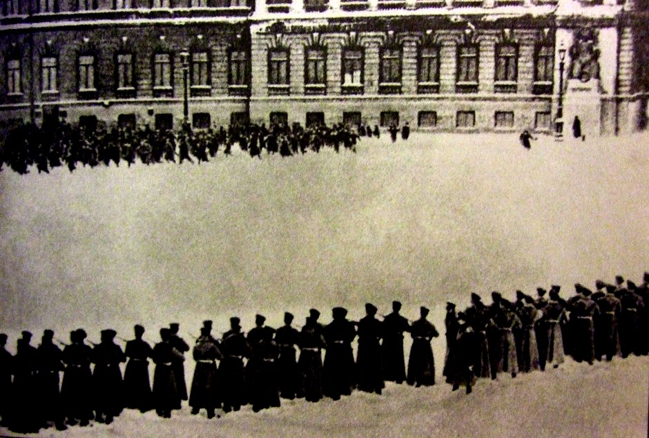 Расстрел рабочего шествия 9 января 1905 года. Фотография Карла Буллы